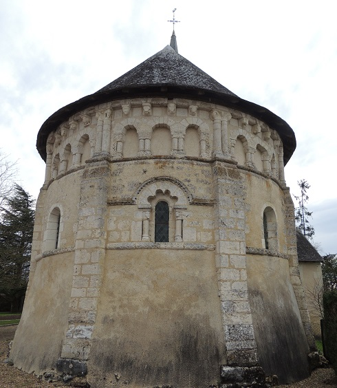 Église Notre-Dame de Nourray, vue depuis son chevet magnifiquement sculpté dans un pur style roman avec des têtes sculptées sous le toit et juste dessous des groupes de 3 arcades séparées par des colonnettes géminées et dessous encore une fenêtre à arcade quadrilobée sculptée et colonnettes de part et d'autres aux chapiteaux sculptés aussi avec grande finesse